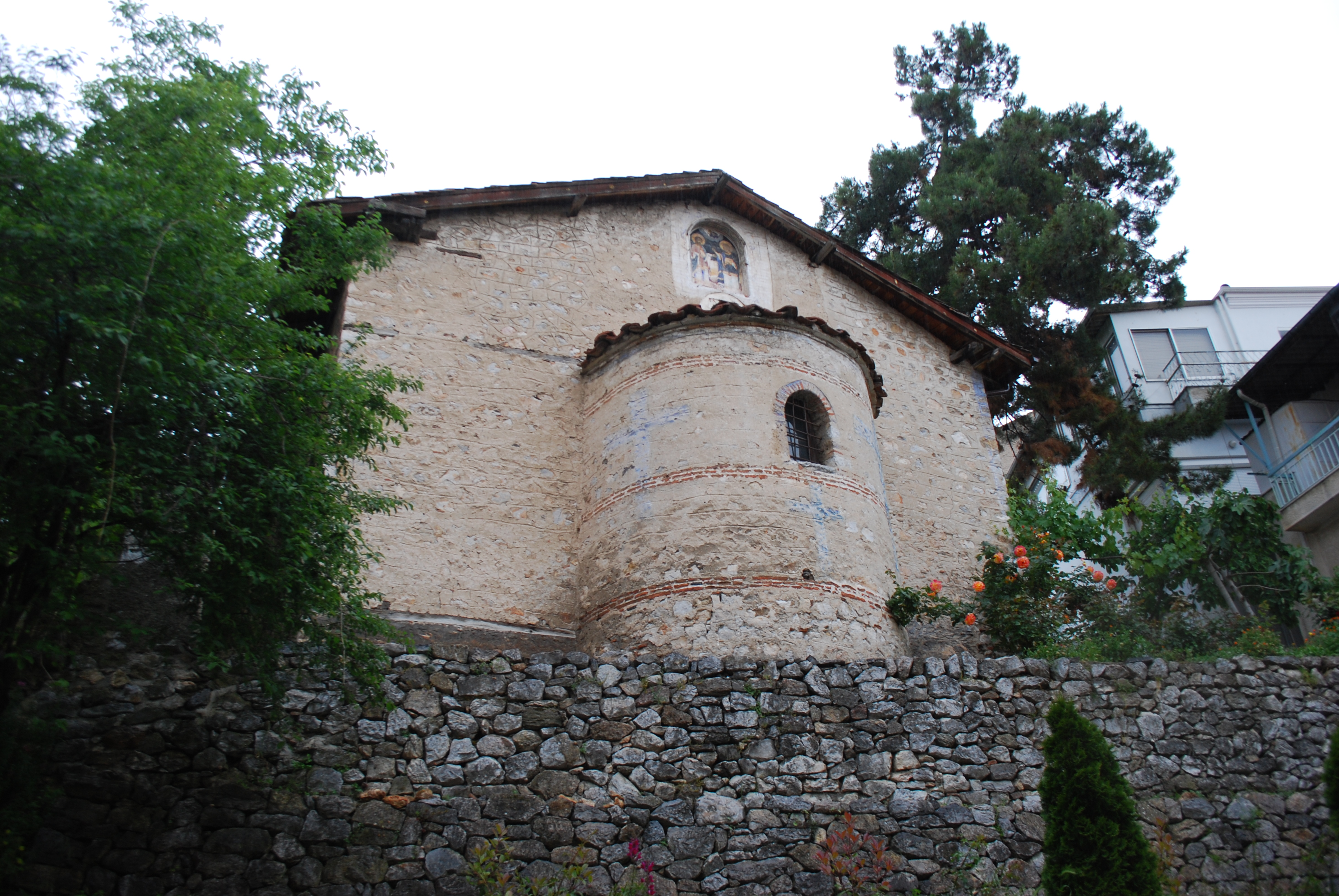 Vue de Kastoria.